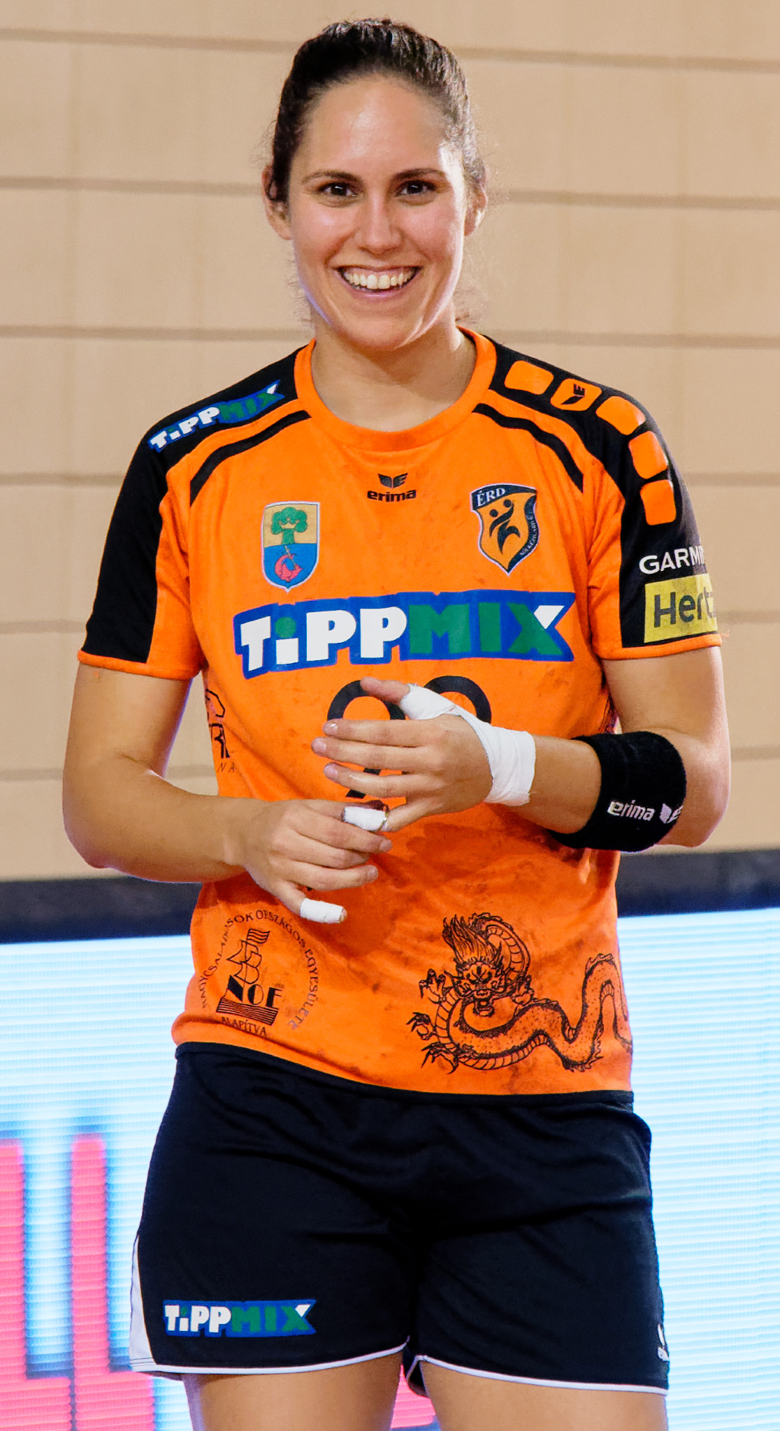 Rencontre retour du 3e tour de la coupe EHF, Issy Paris Hand / Erd. A Issy Les Moulineaux, le 18 novembre 2017.